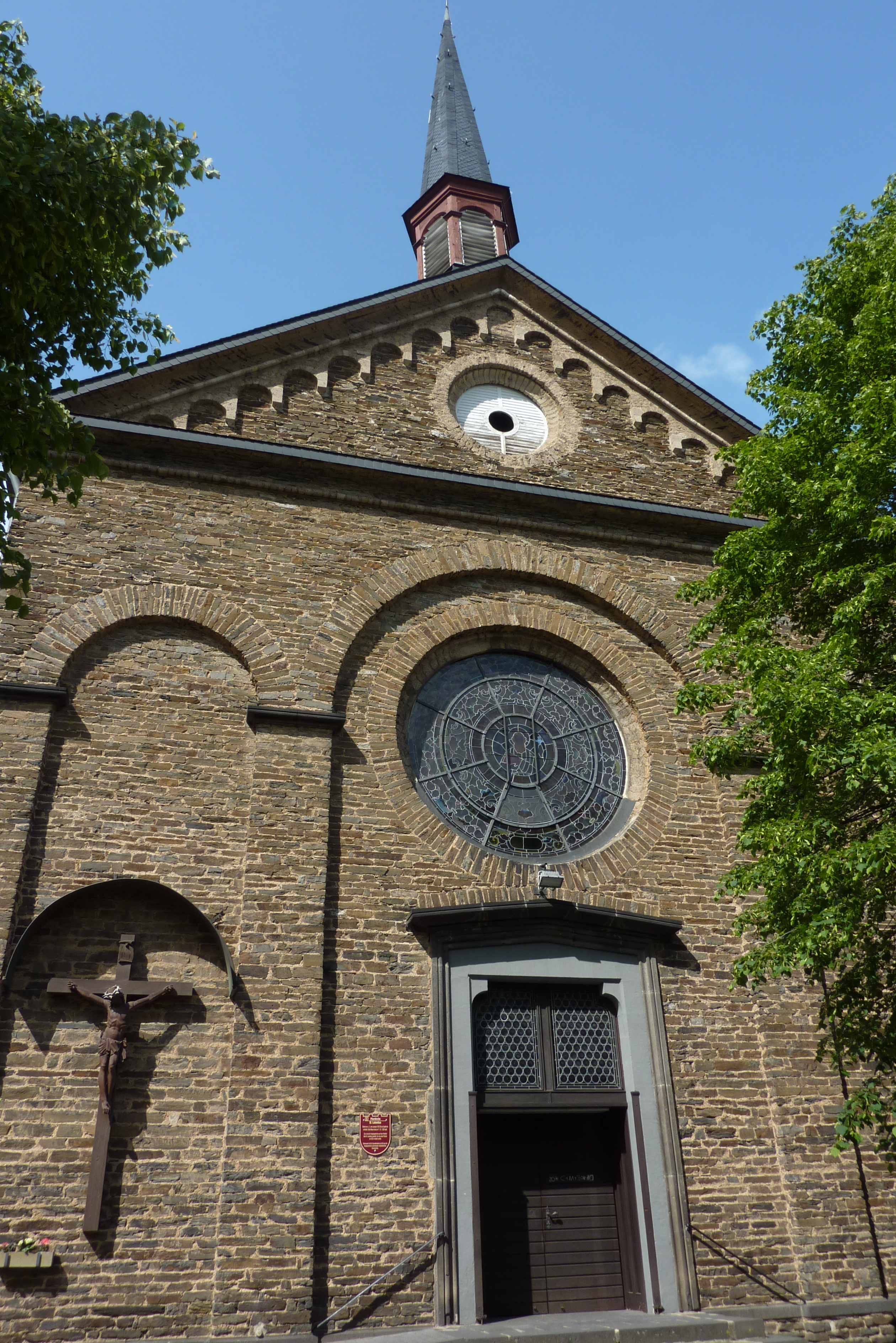 katholische Pfarrkirche St. Lubentius in Kobern-Gondorf, Westfassade mit Hauptportal